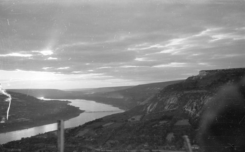 Dnjestr am Abend, von Katharinowka gesehen Unguri unterhalb Mogilew, Juli 1941